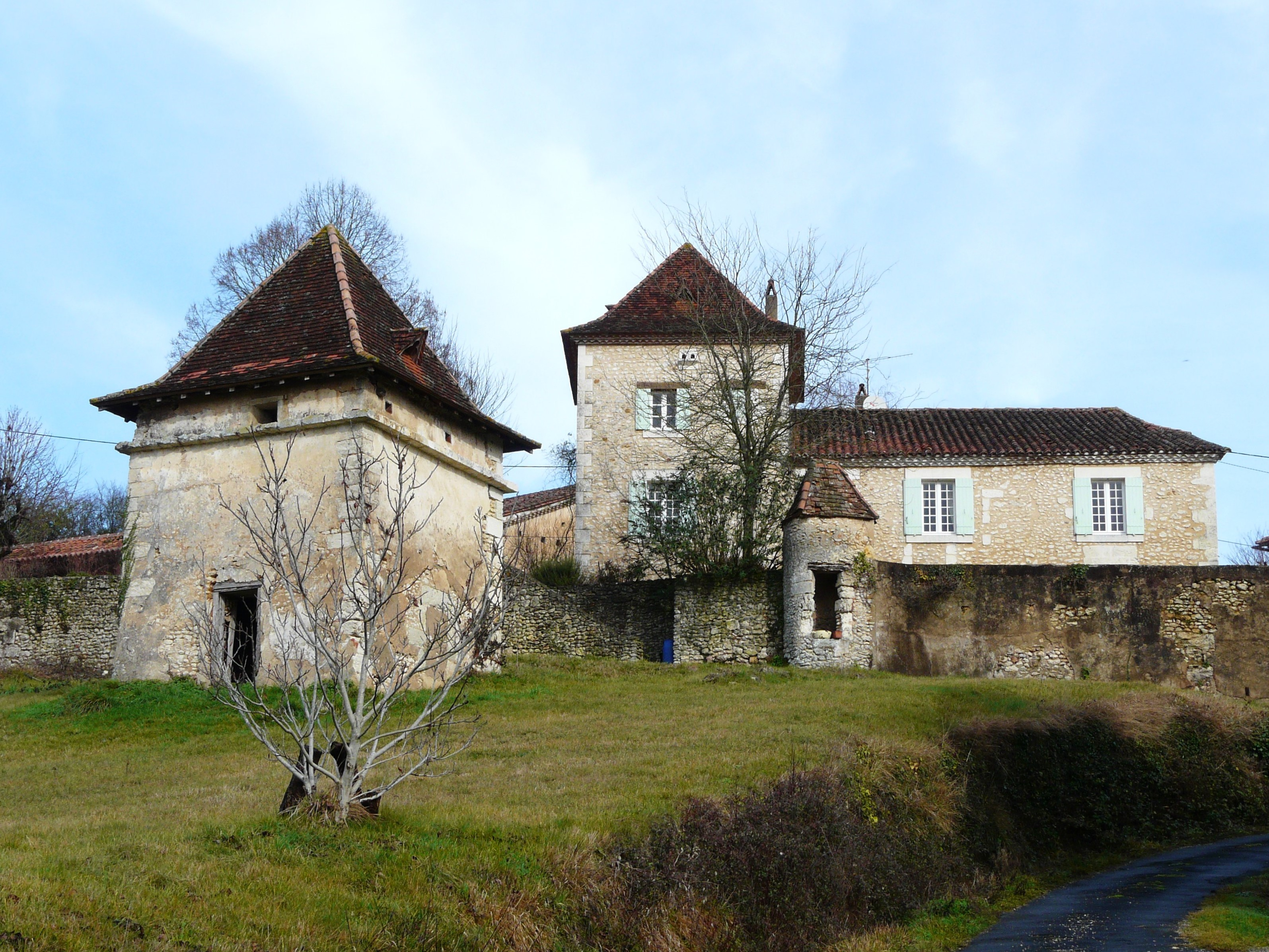 Lieu-dit le Meynard, Saint-Germain-du-Salembre, Dordogne, France.